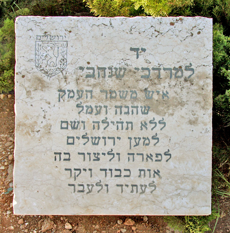 Monument for Mordechai Shenahavi in Jerusalem.